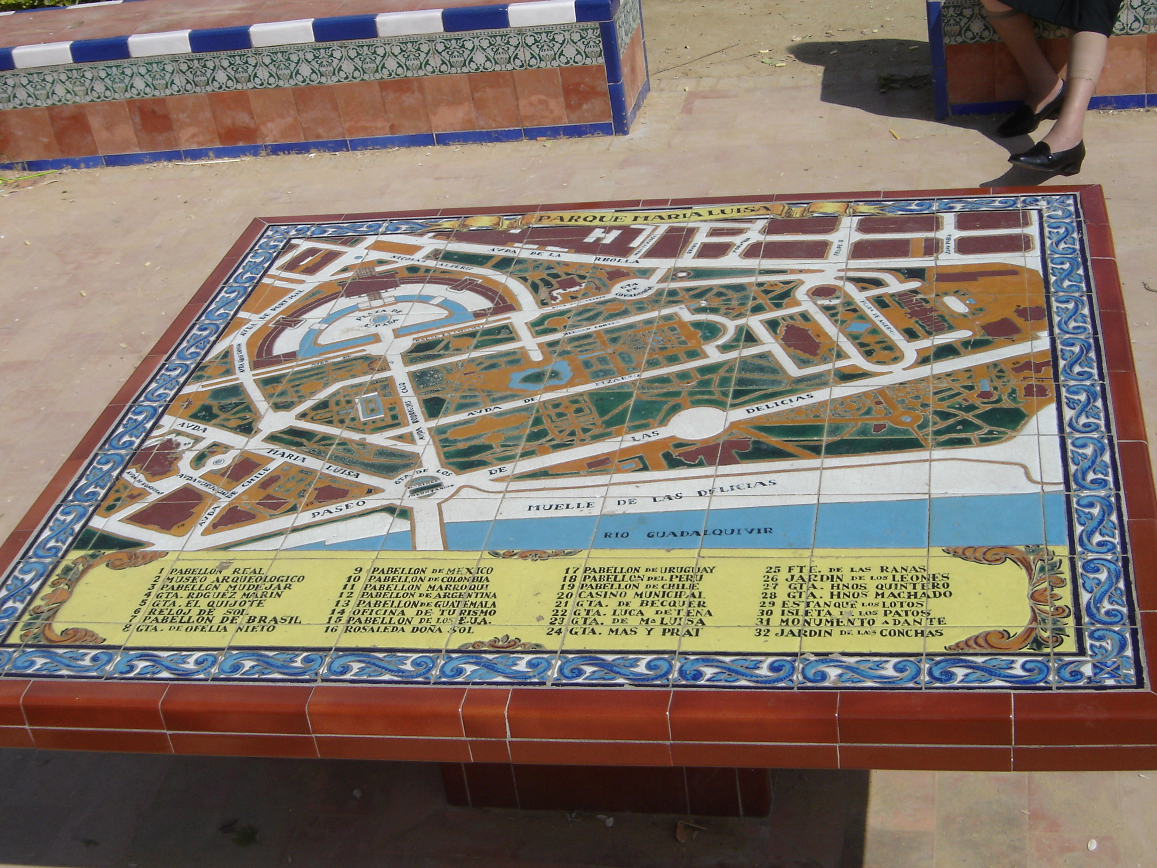 Glorieta de la Mesa Mural. Plaza de América, Parque de María Luisa (Sevilla). Realización propia.